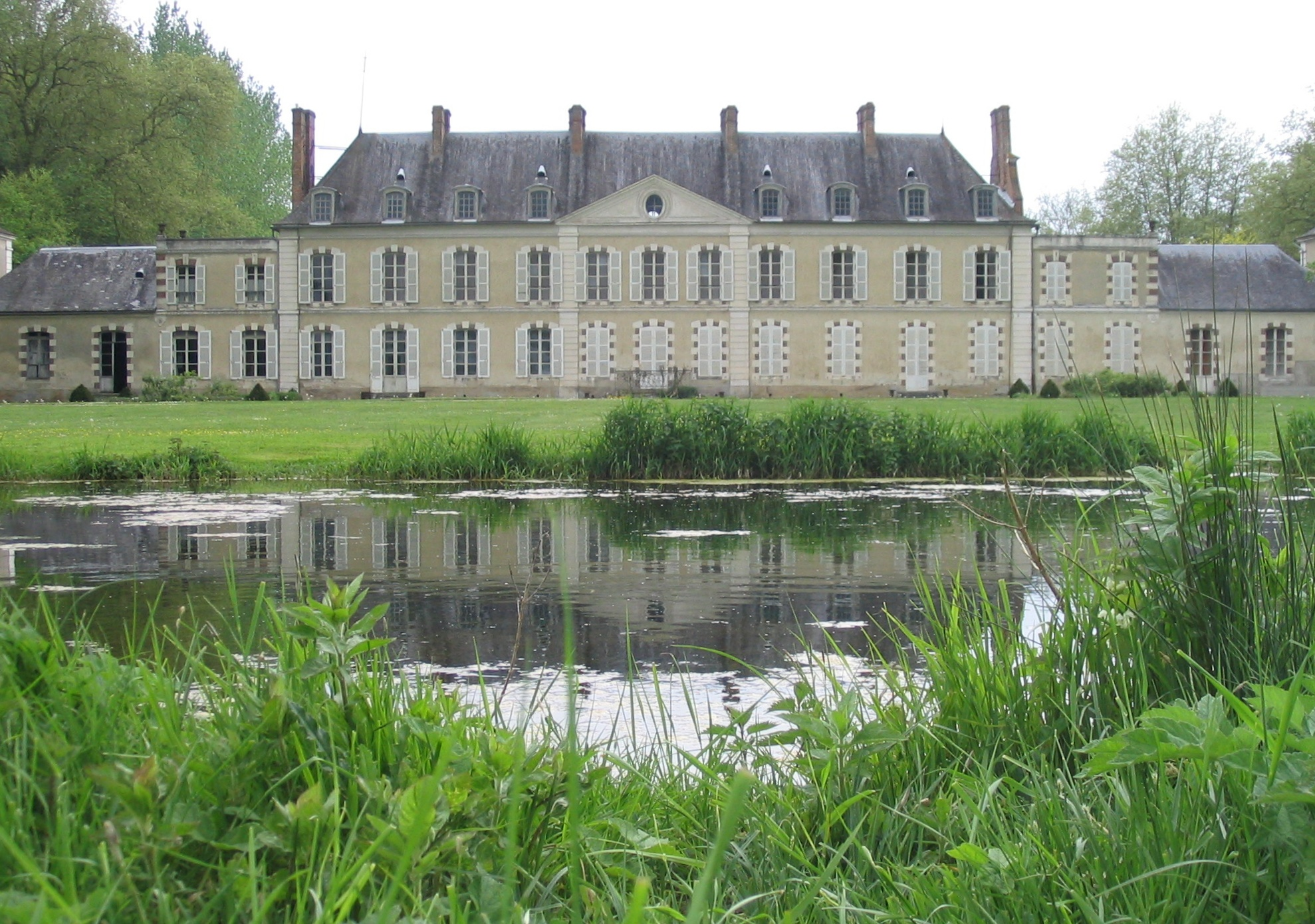 Château d'Esnon